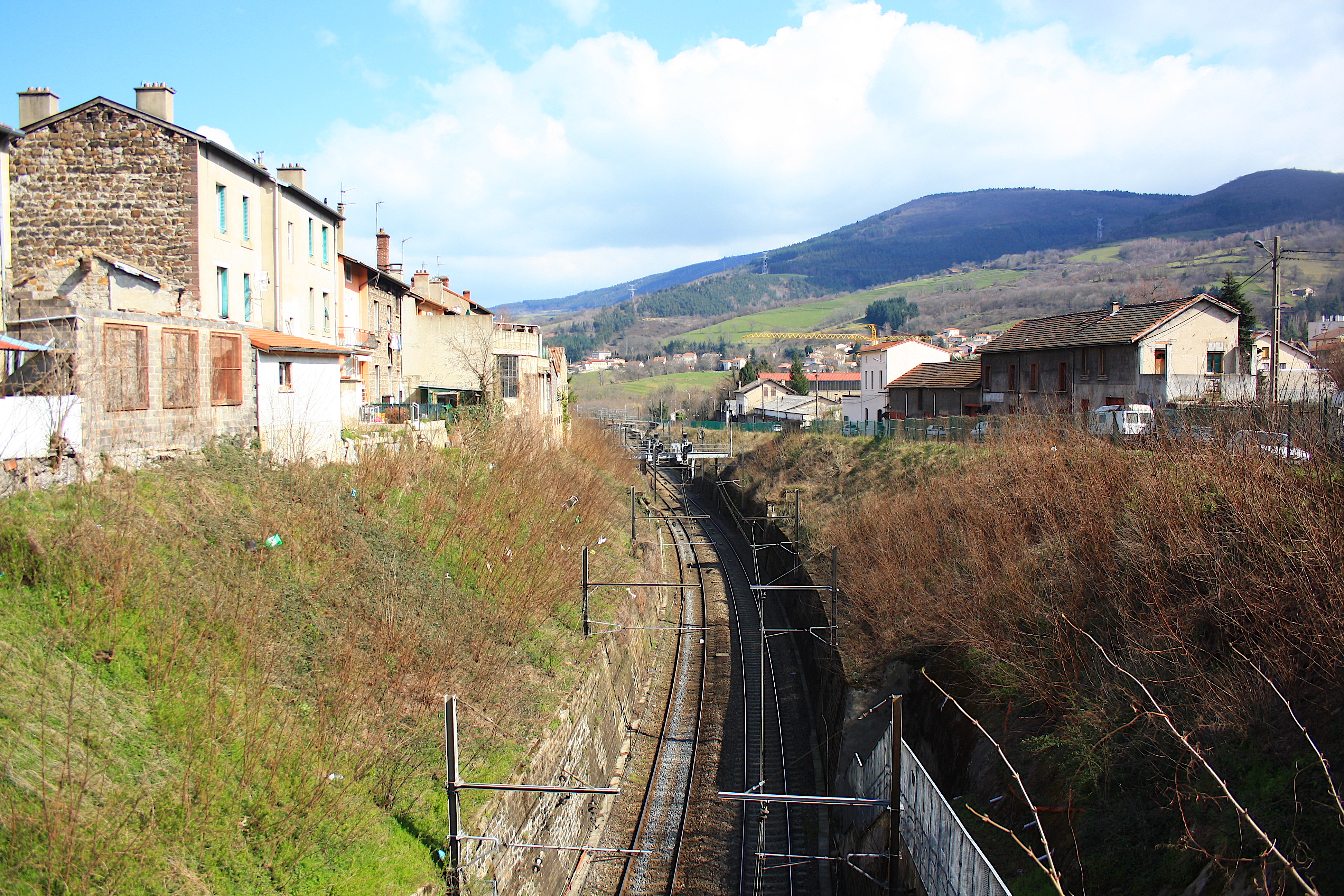 Depuis le centre de Terrenoire, vue sur le rail en direction de Saint-Chamond et le Pilat sur la droite.